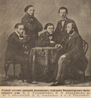 ЖУРНАЛ «ИСКРЫ», ГОД ДВЕНАДЦАТЫЙ Иллюстрированный художественно-литературный и юмористический журнал с карикатурами. Выходит еженедельно при газете «Русское Слово». № 11, Воскресенье, 11 марта 1912 г.